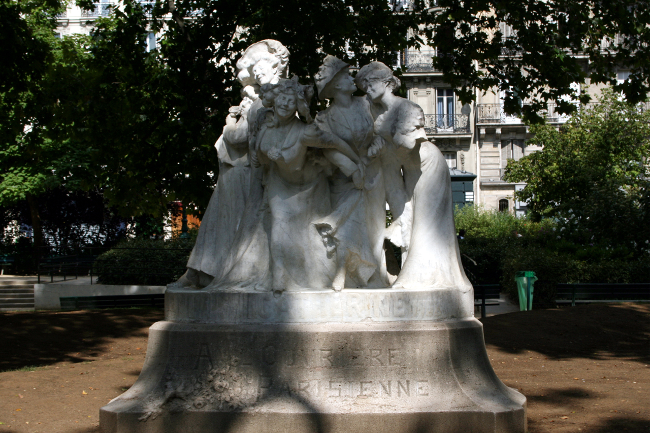 Statue square Montholon